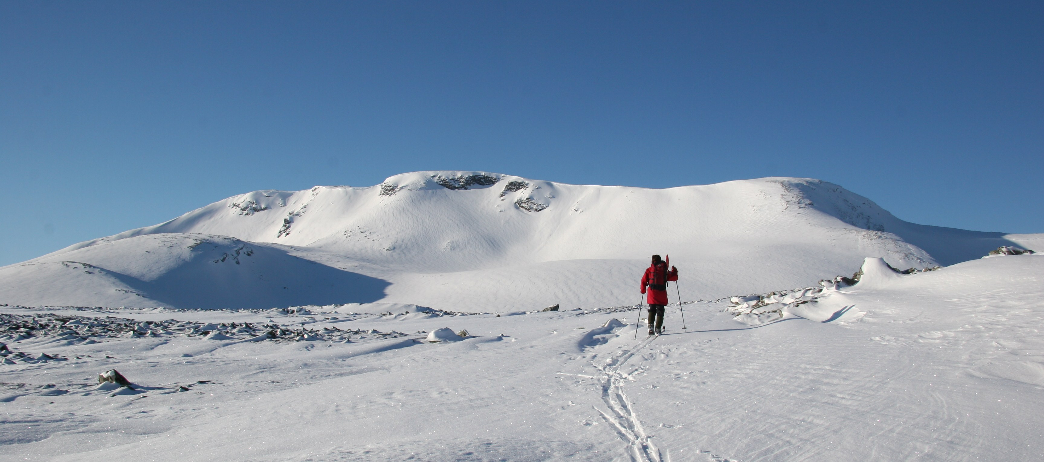 Fjellet Svarthetta (1548 moh) i Trollheimen, Sør-Trøndelag. Bildet er tatt østfra